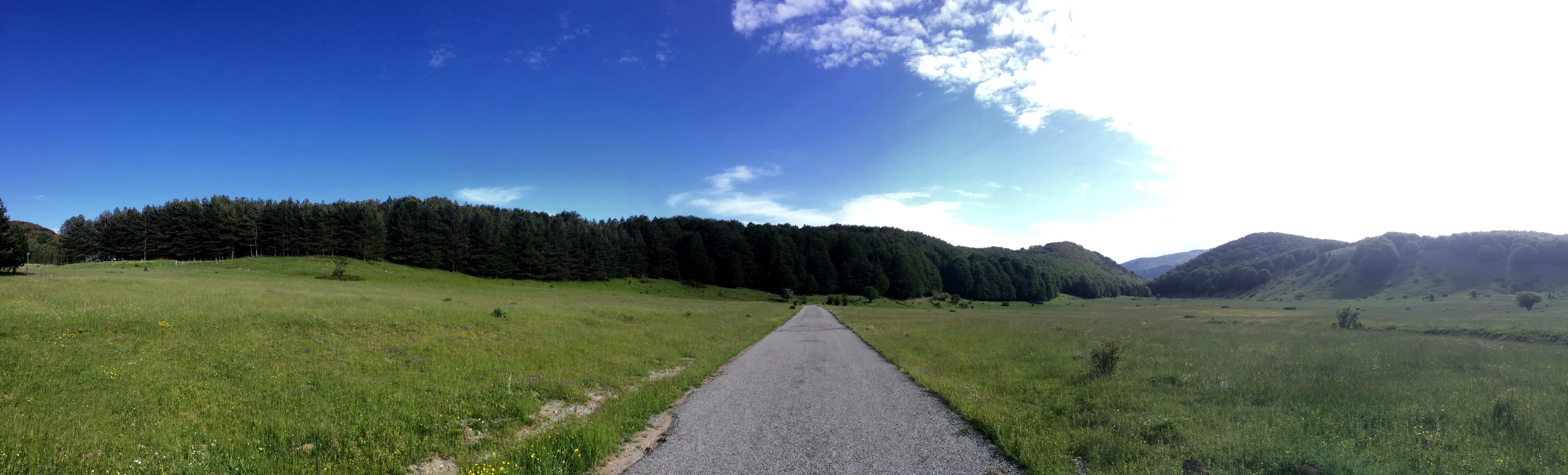 Panoramica della strada che porta a Piano Campolongo, Lungro.